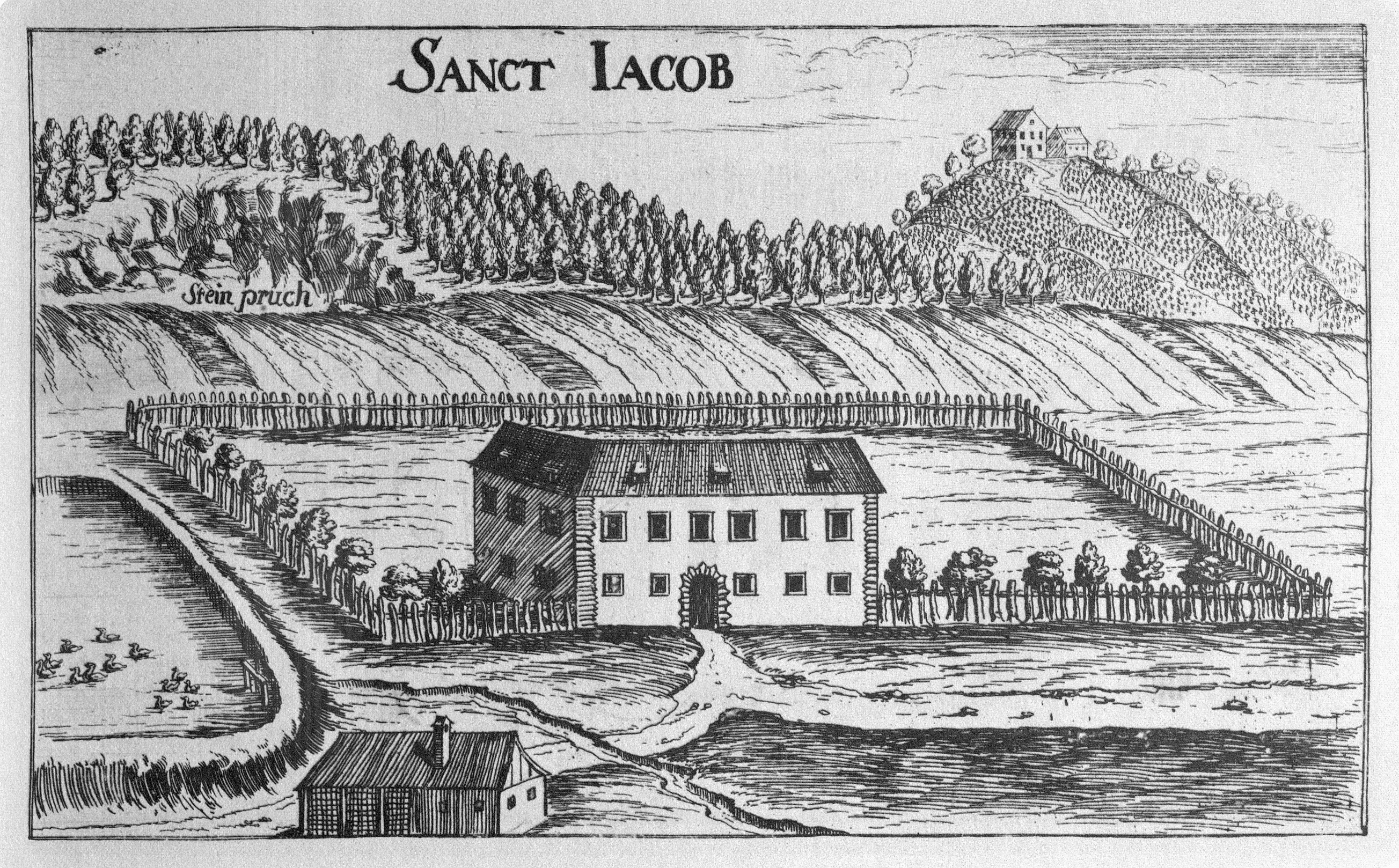 G. M. Vischers Käyserlichen Geographi, Topographia Ducatus Stiriae, Das ist: Eigentliche Delineation / und Abbildung aller Städte / Schlösser / Marcktfleck / Lustgärten / Probsteyen / Stiffter / Clöster und Kirchen / so es sich im Herzogthumb Steyrmarck befinden; Und anjetzo Umb einen billichen Preyß zu finden seynd Bey Johann Bitsch Universitäts Buchhandlern / Auff dem Juden=Platz bey der guldenen Saulen. Graz 1681 Die Nummerierung der Dateien folgt der alphabetischen Reihung der Ortsnamen und entspricht nicht dem Vischer-Register